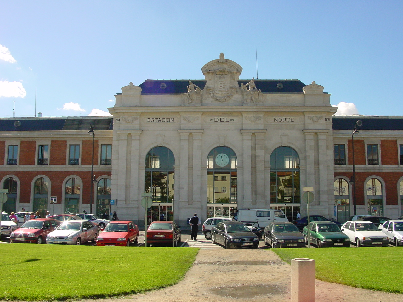 Estación de ferrocarril de Valladolid (España)